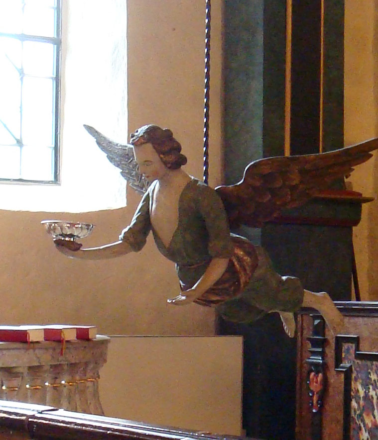 Kyrkängeln i Hakarps kyrka.